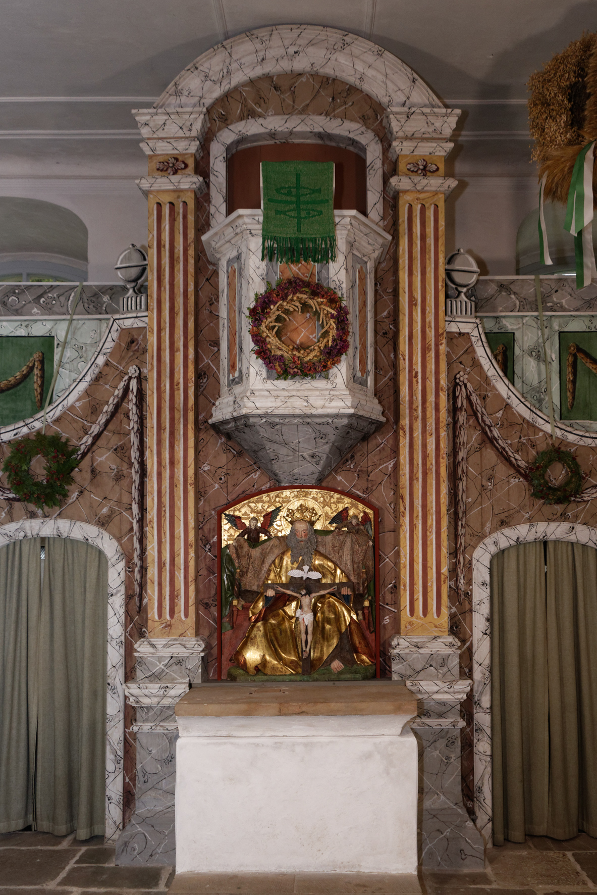 Ansicht des Kanzelaltars, restauriert 2016